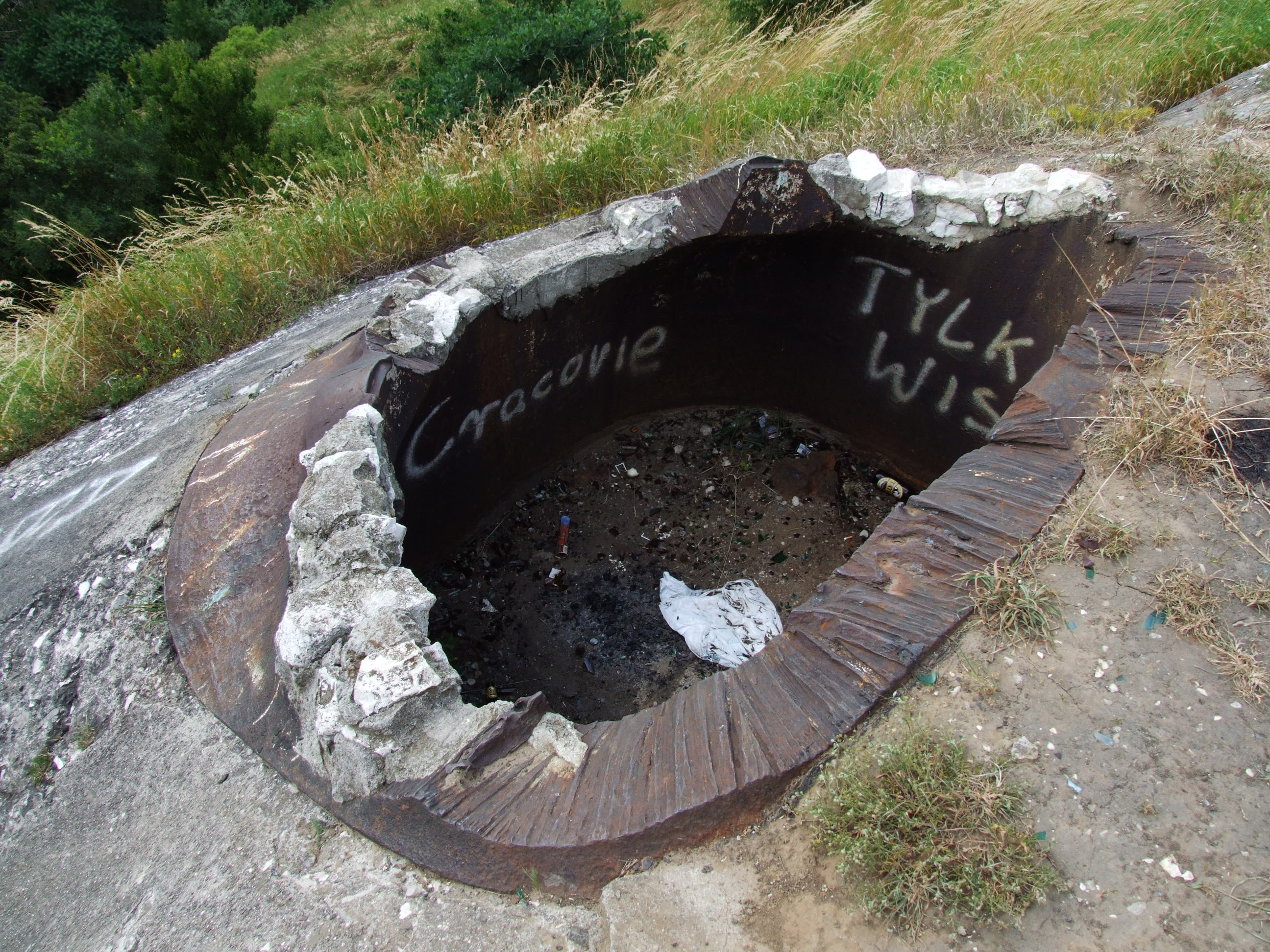 Festung Krakau - Fort Bielany. Zniszczona (kopuła odcięta palnikiem) wieża pancerna fortu bojowego (określanego też jako tradytor)